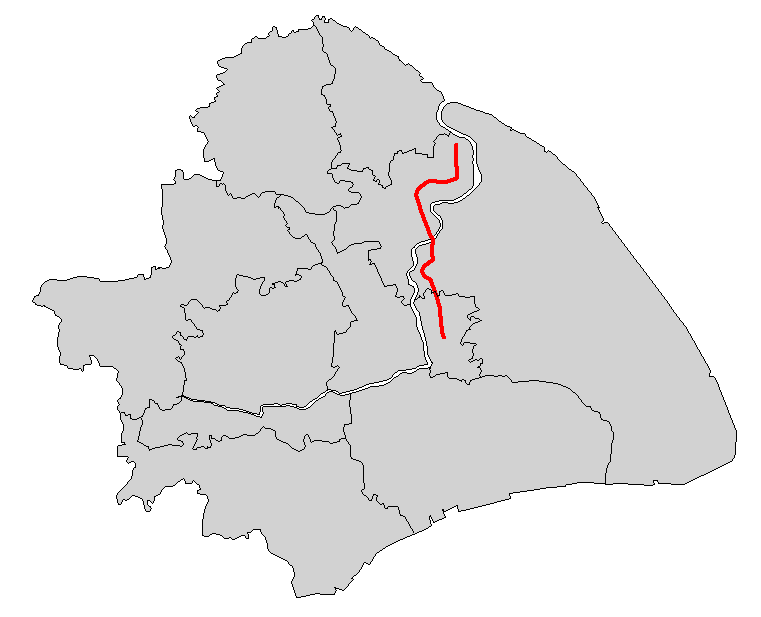 上海轨道交通8号线简图 本地图的底图不表示上海市全部所辖区域 因版面关系，上海市所辖之崇明岛、长兴岛等与本线路无关的离岛未在本图中表示。